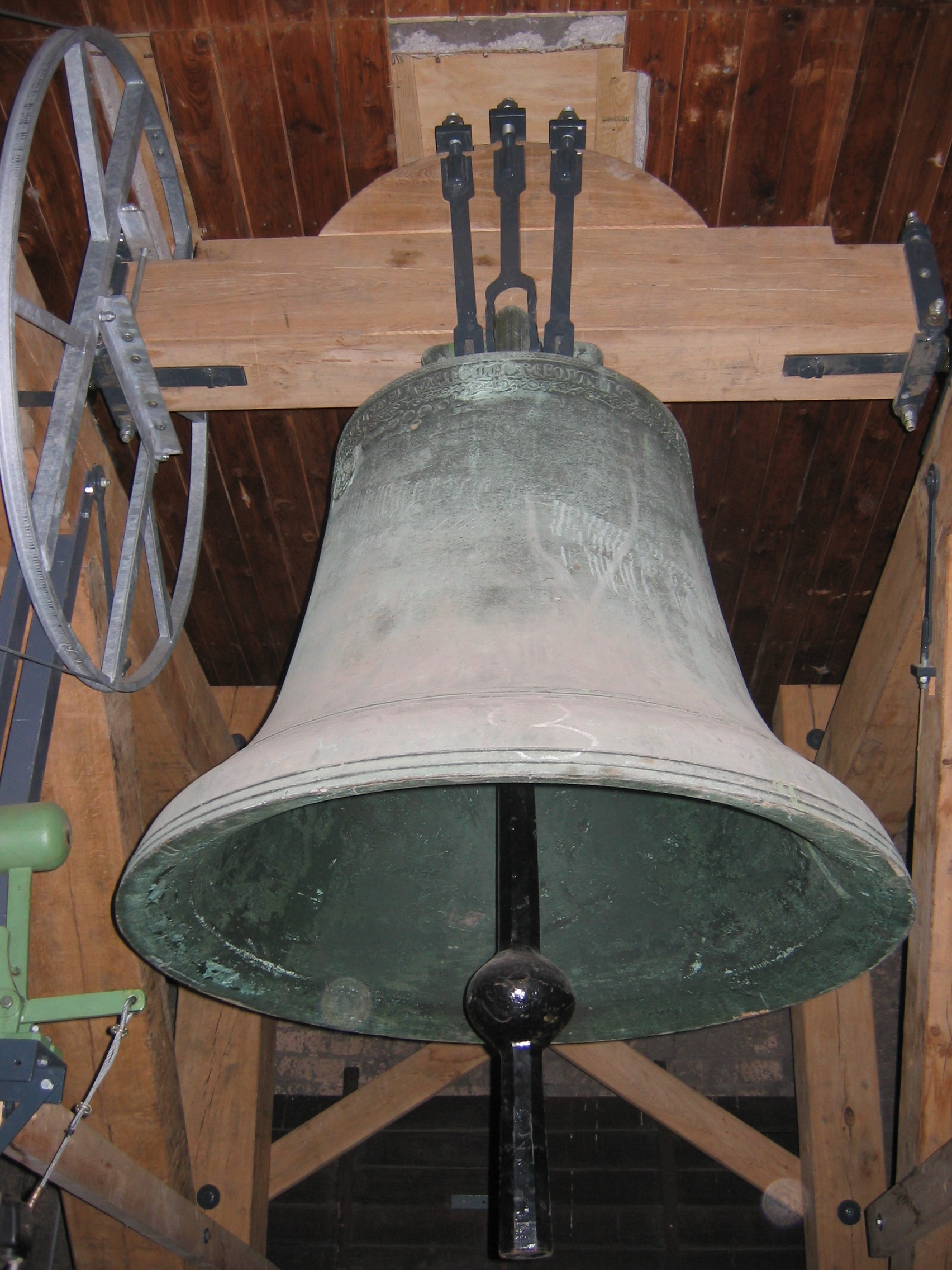 Marienglocke. St. Aposteln, Köln.